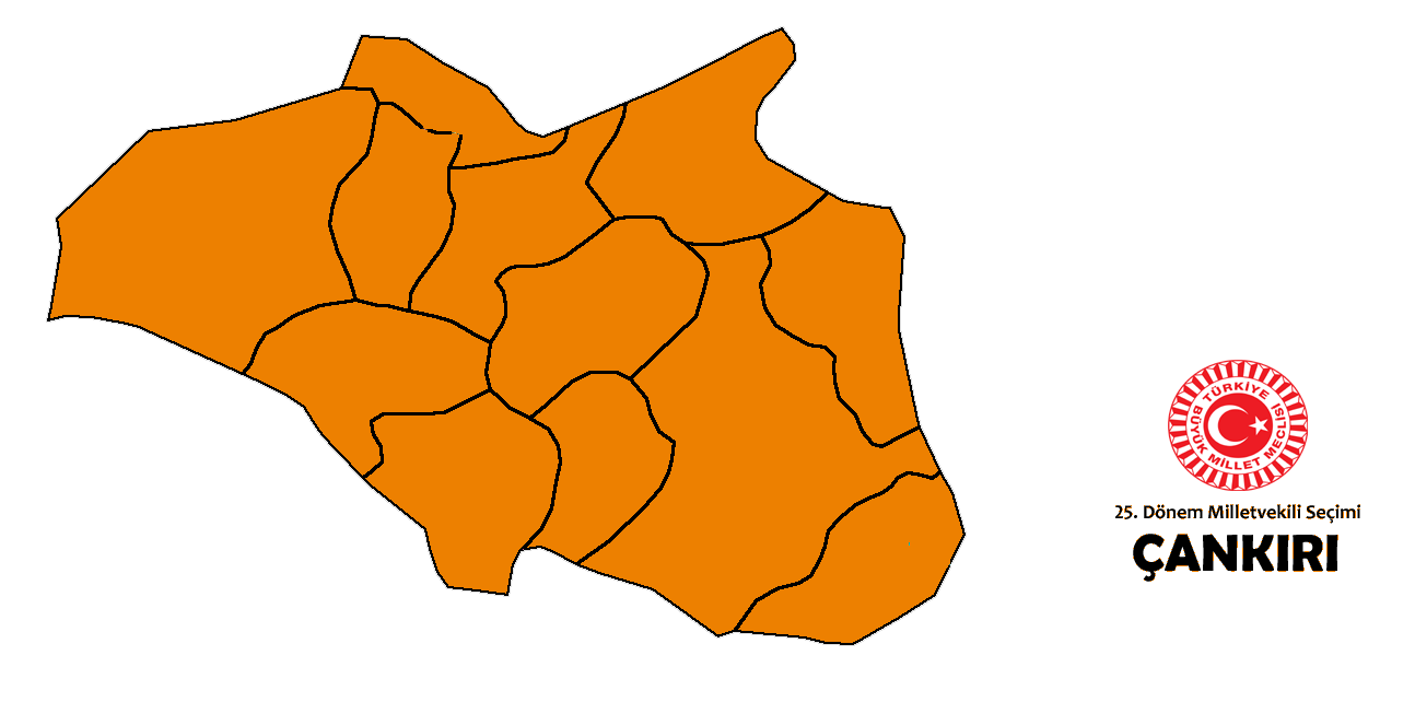 2015 genel seçim sonuçları